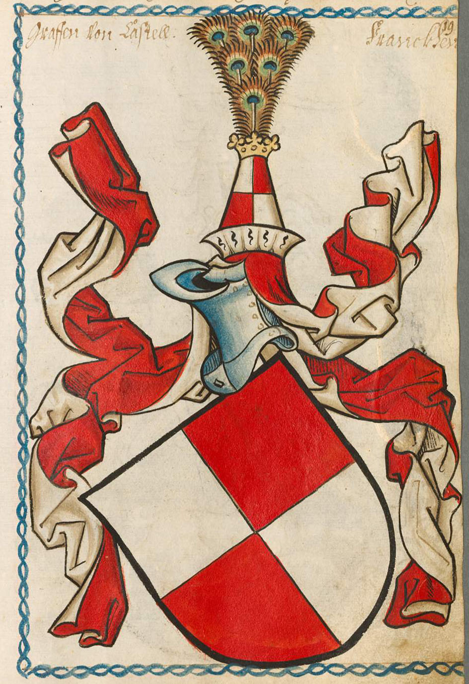 Scheibler'sches Wappenbuch , älterer Teil Franken Grafen von Castell